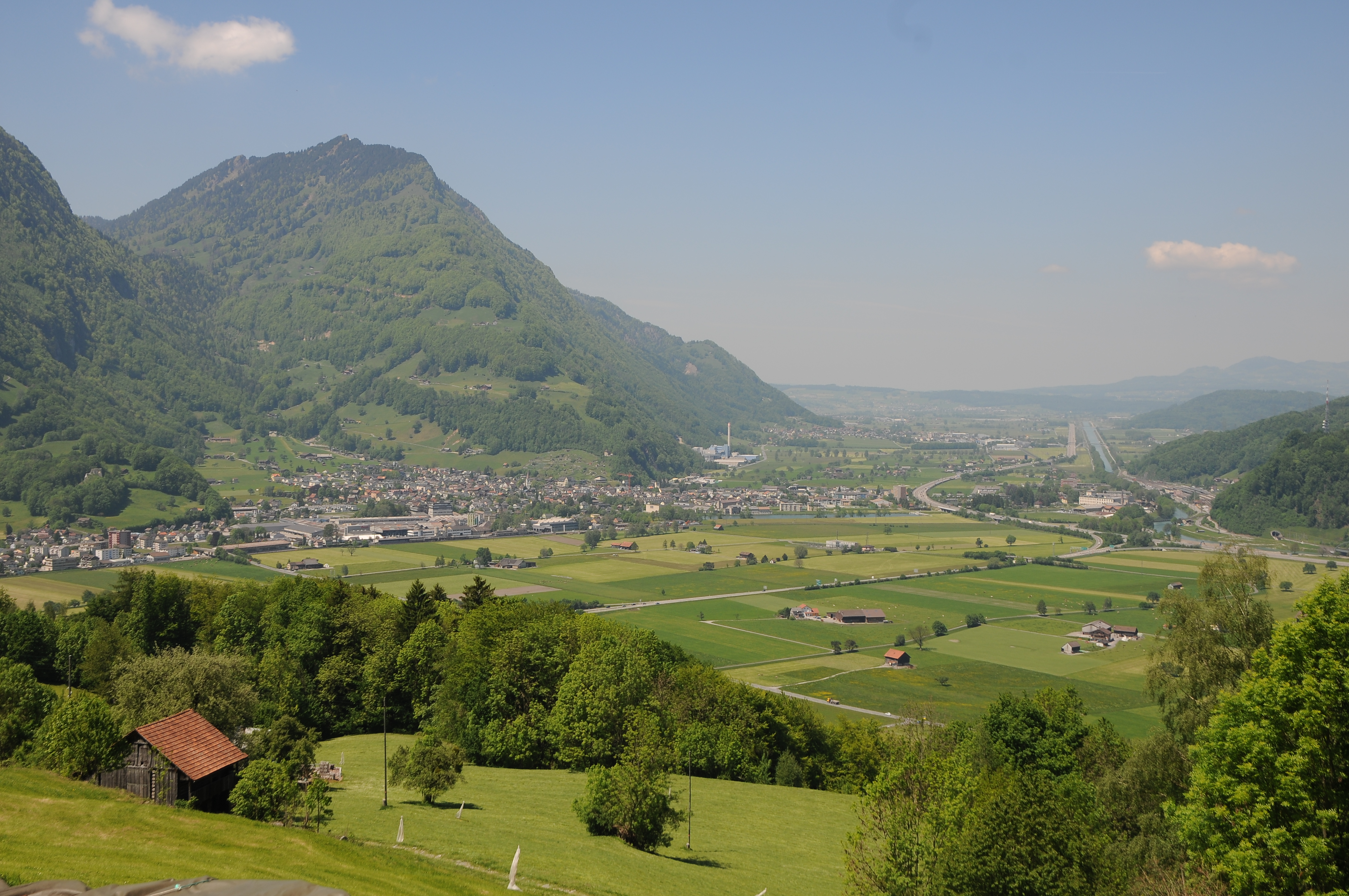 Blick von der Kerenzerstrasse in der Parzelle "Vor dem Wlad" auf Niederurnen und die Linthkanal. Die Autobahn A3 führt nach Zürich.